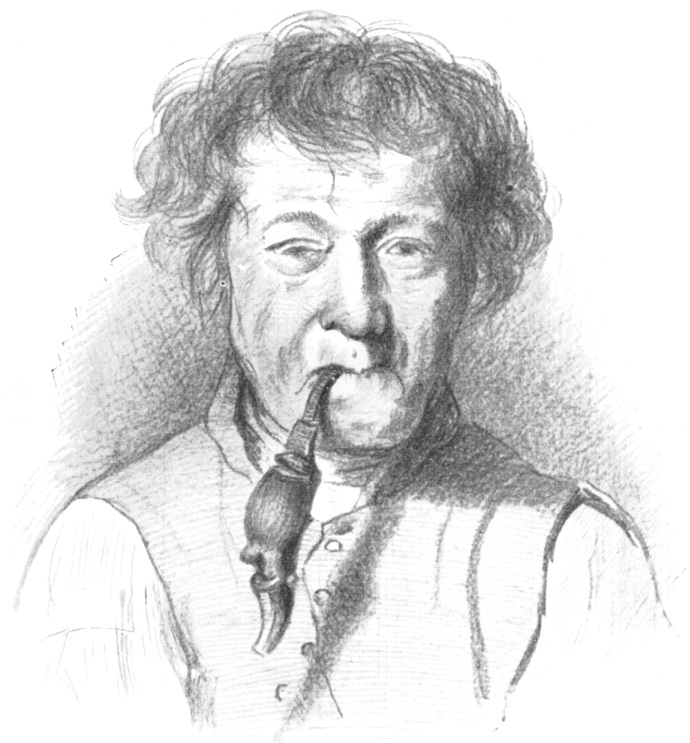 Originalbildunterschrift: „Hexenmeister.“ Oberspreewald. 1877